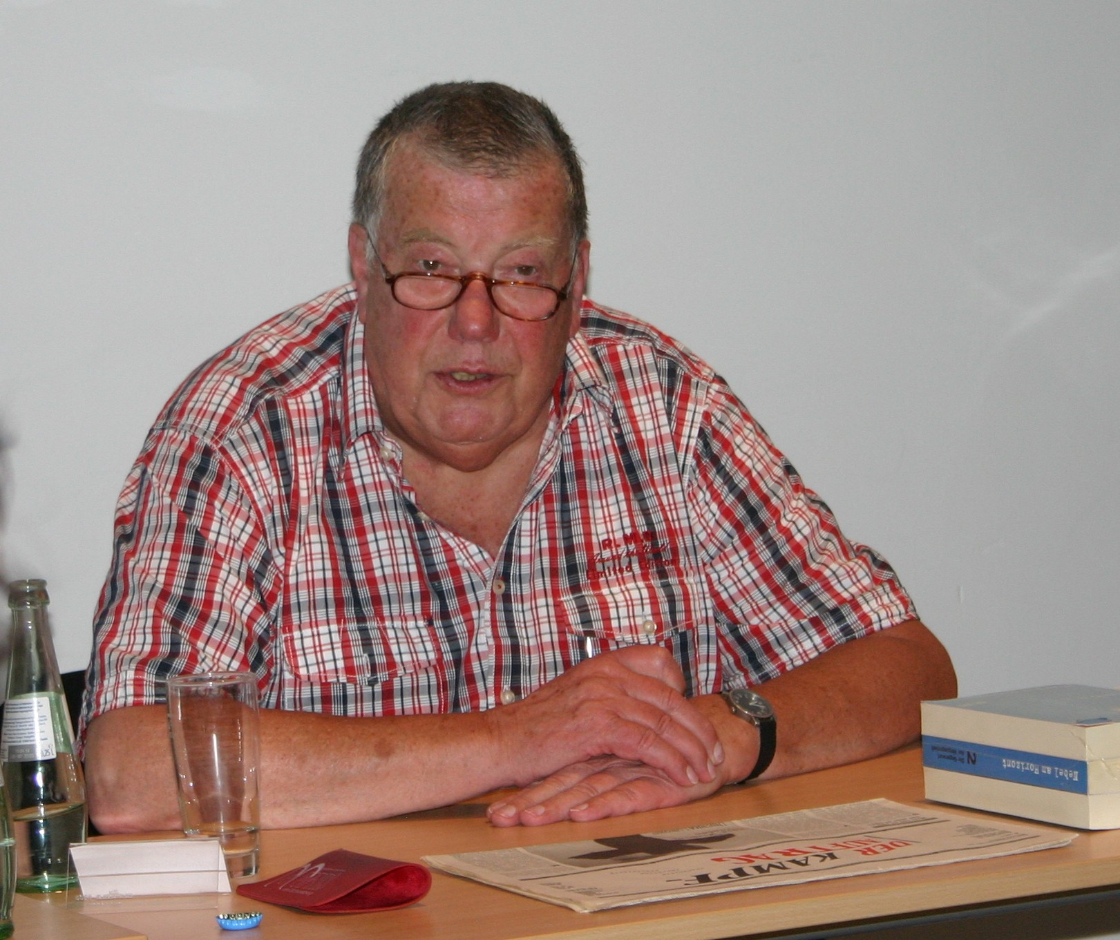 Der Galerist und Publizist Jürgen Schweinebraden (Jürgen Walther Herrmann Schweinebraden Freiherr von Wichmann-Eichhorn) während einer Buchlesung in Berlin-Mitte.